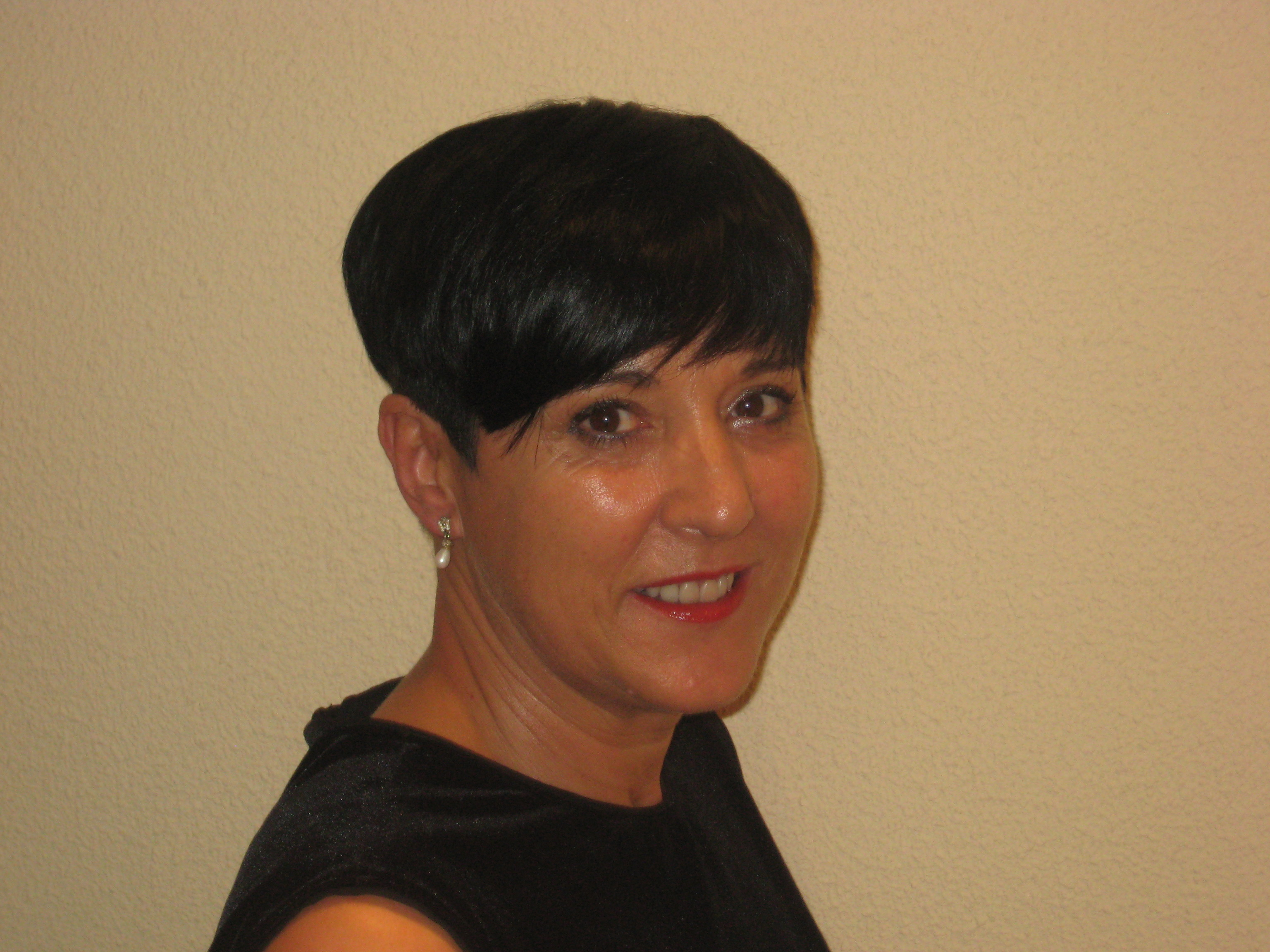 Tasús Burguete